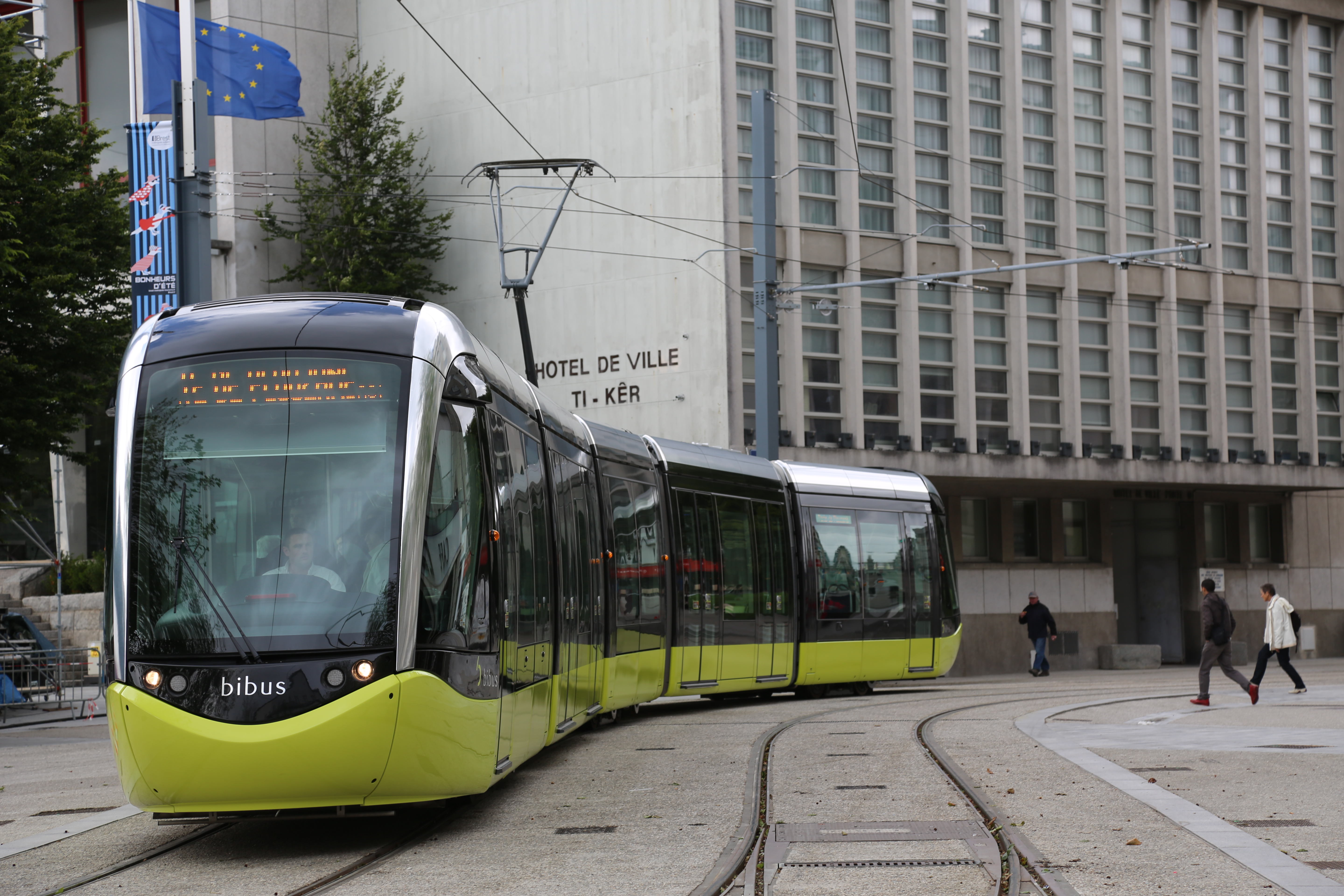 Photos autour de l'inauguration du Tramway à Brest le 23 juin 2012